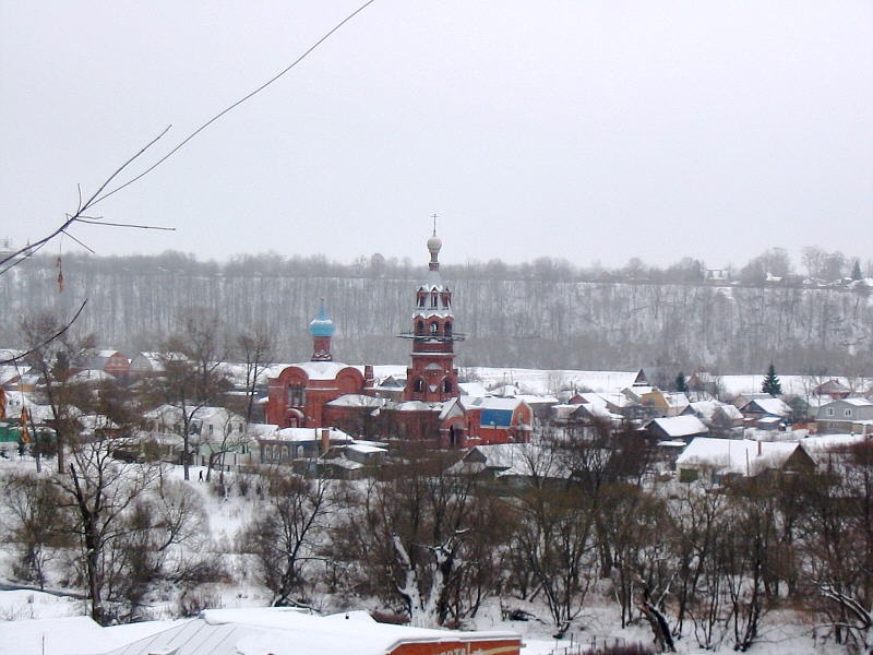 Боровск Категория:Изображения:Россия